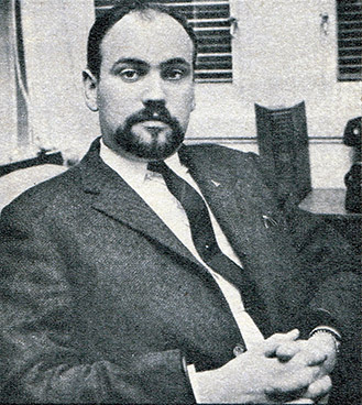 Torbjörn Axelman.